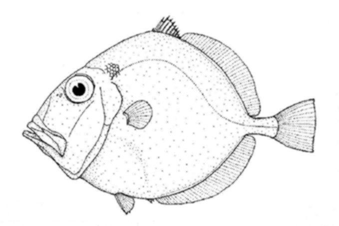 Cyttus traversi (King dory)